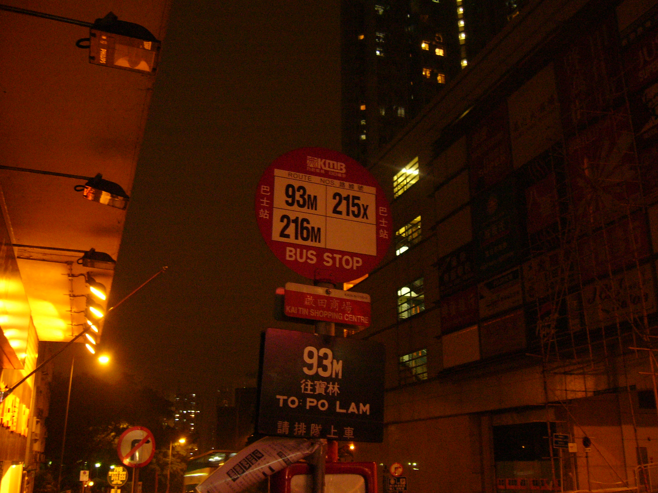 A bus stop in Kai Tin, Lam Tin, Hong Kong